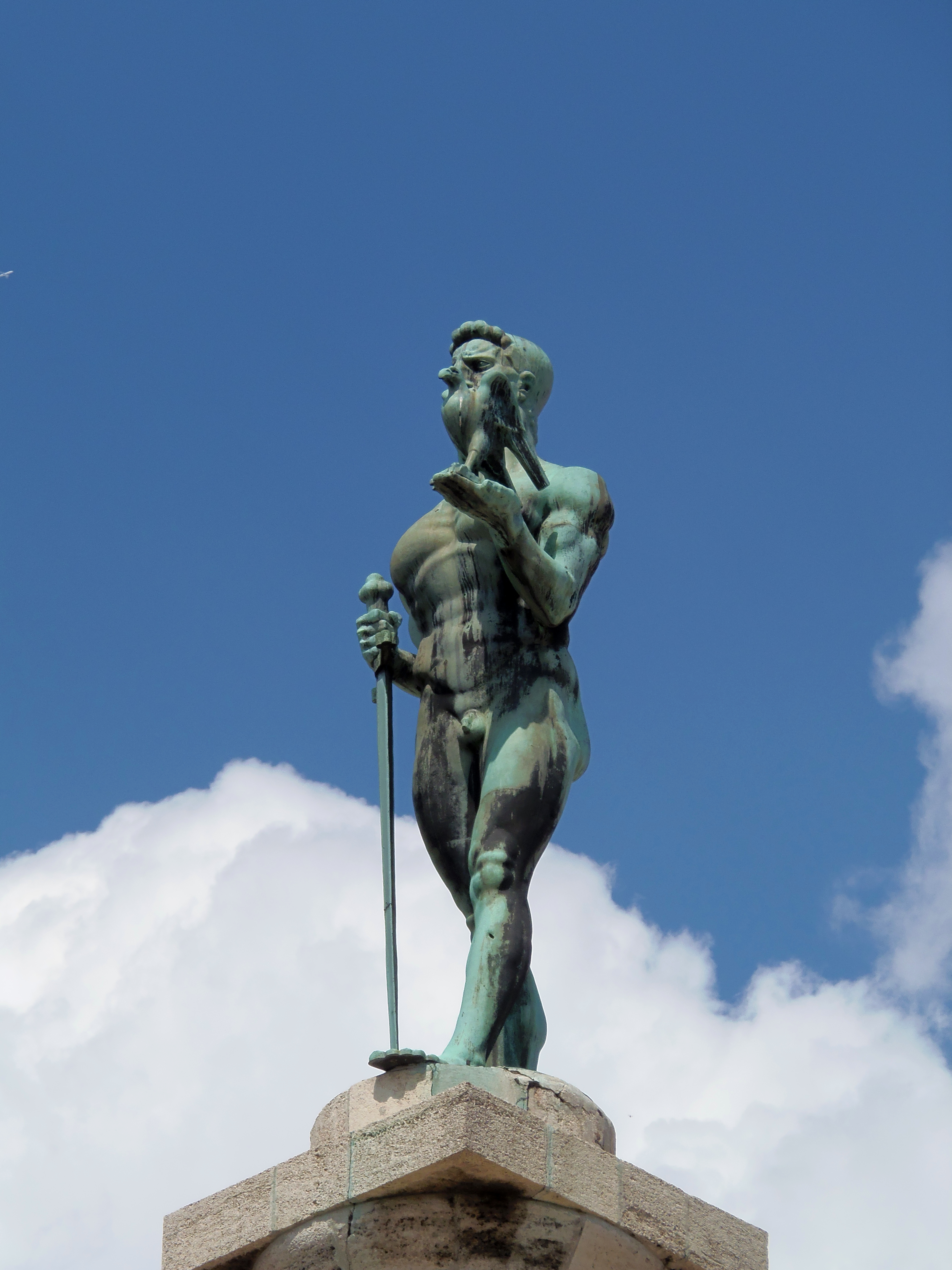 Споменик "Победника" на Калемегдану, у Београду, Србија. Кадар на скулптури.